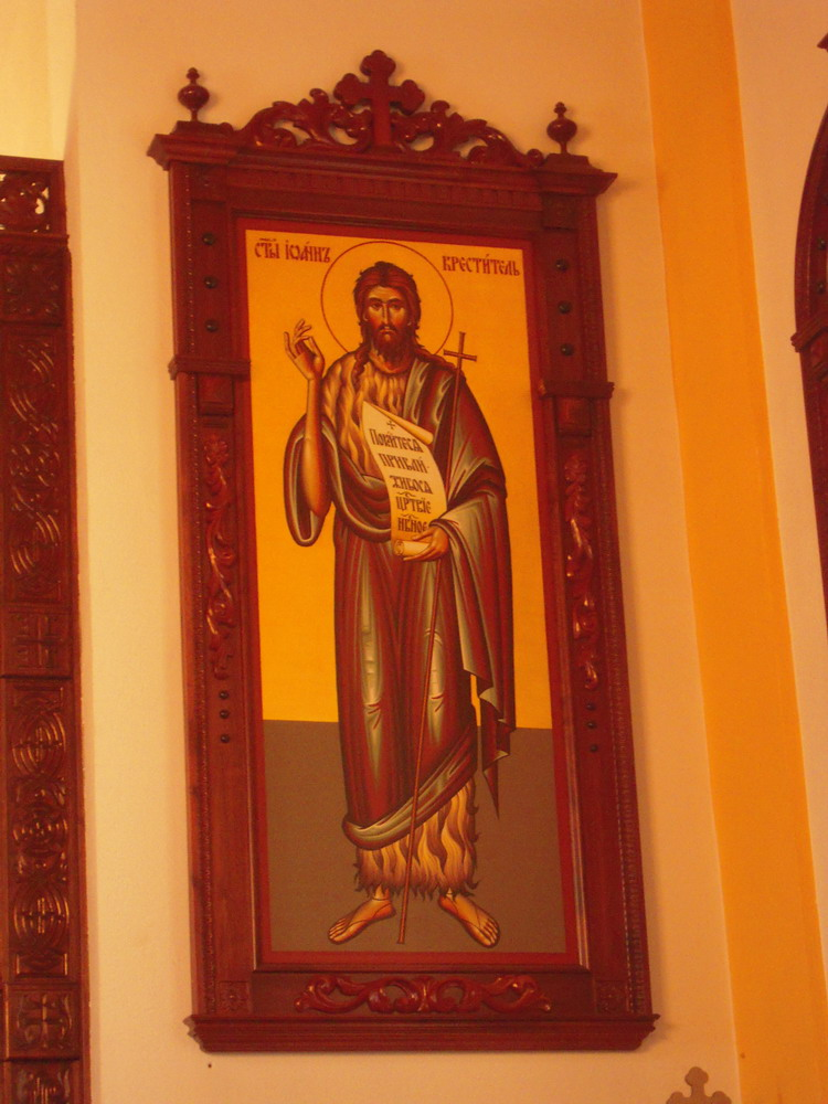 Ikona Svetog Jovana u manastiru Krupa.